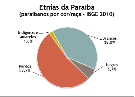 Grupos étnicos do estado da Paraíba em 2010, segundo o IBGE.